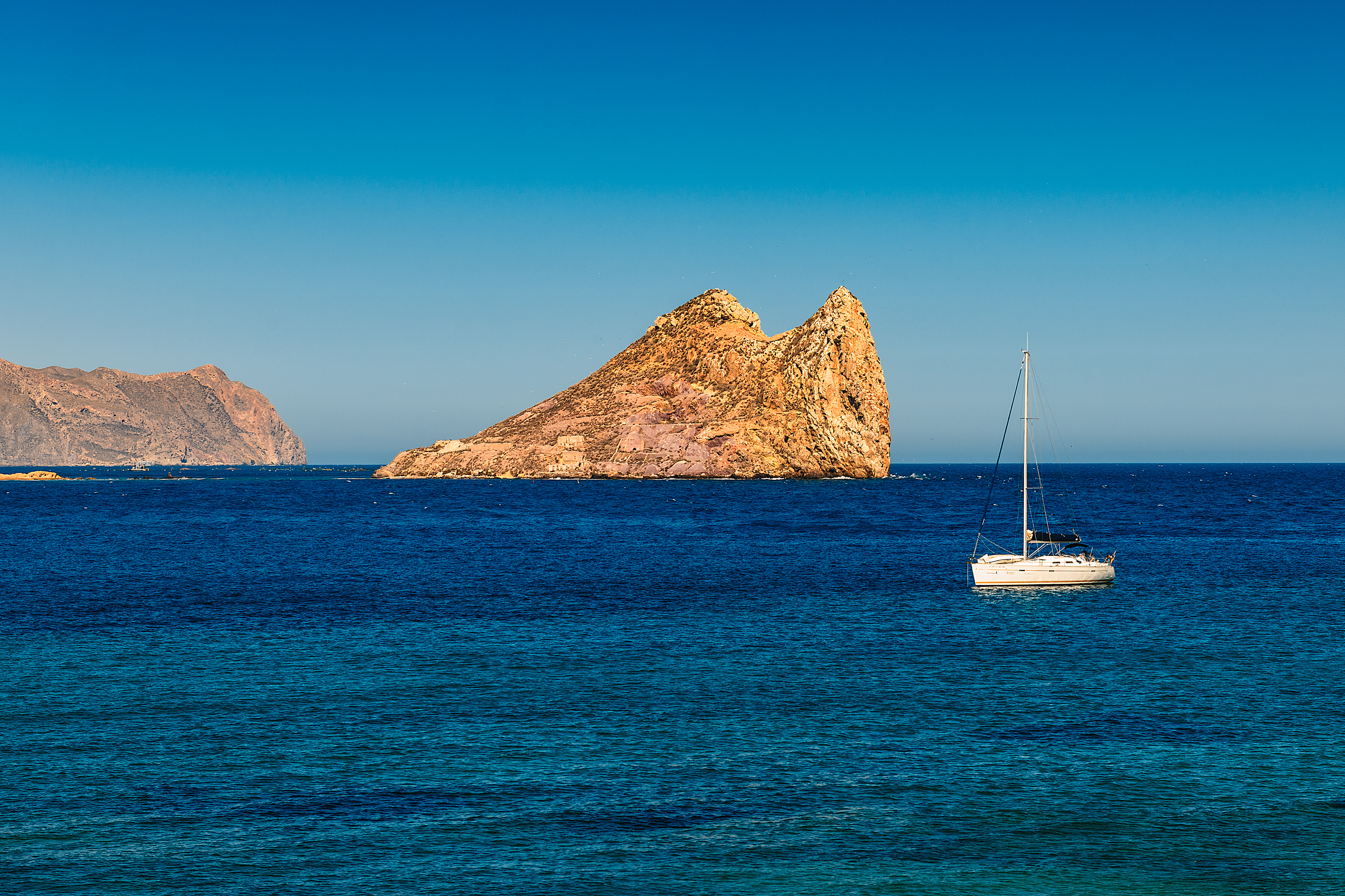 La isla del Fraile es una isla escarpada y pedregosa de 6,3 hectáreas de superficie situada al este de Águilas (Murcia), España. Presenta una vegetación inframediterránea, y uno de los fondos marinos más ricos del Sudeste peninsular, especialmente debido a sus poblaciones de Posidonia oceanicas. Es lugar de paso y avistamiento de delfines y posee una importante colonia de gaviotas. Geológicamente pertenece a las cordilleras Subbéticas, con representación del complejo Maláguide y Alpujárride. Durante el período de ocupación romano, albergó una fábrica de la salsa Garum. Ha sido declarada Espacio Natural Protegido. Se ha propuesto que el orónimo «Fraile» podría haber evolucionado a partir del término «farellón» (equivalente a farallón). (Wikipedia) This is a photography of a Special Area of Conservation in Spain with the ID: ES6200007. Natura2000 entry, EEA entry